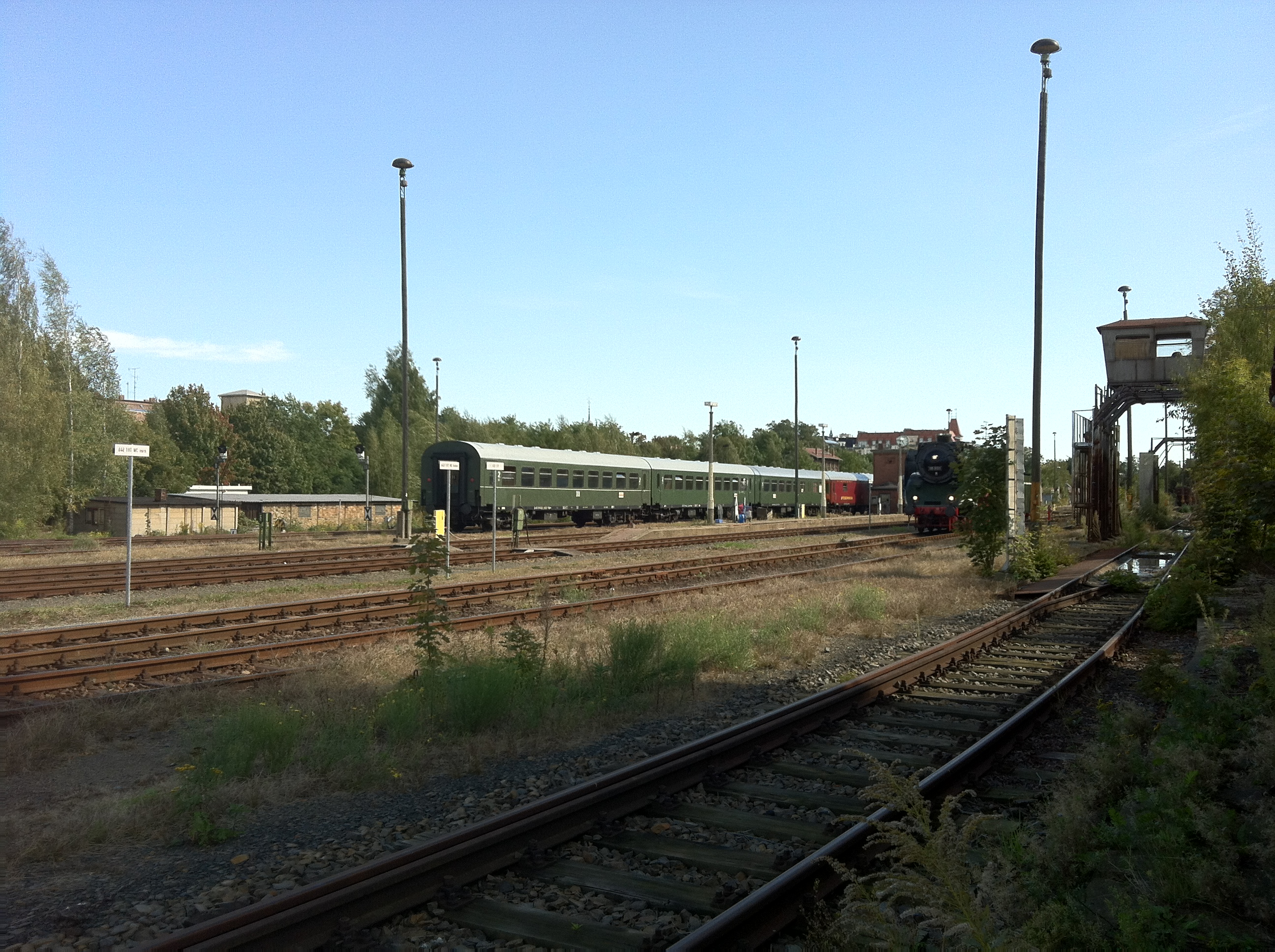 Dampflok 18 201 in der Abstellgruppe des Bahnhofs Görlitz, rechts die Großwaschanlage GWA-4